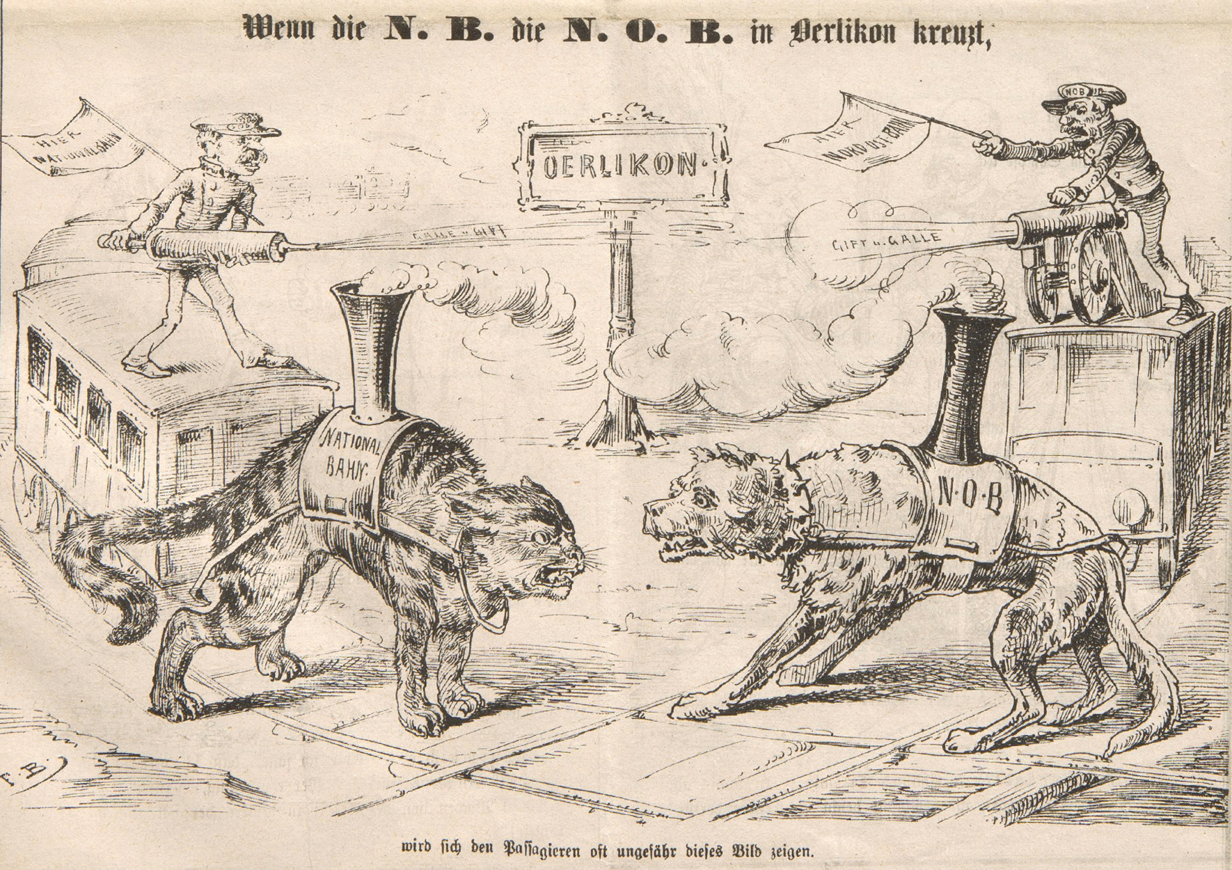 Karikatur des Nebelspalters zum Konkurrenzverhältnis der Schweizerischen Nationalbahn und der Schweizerischen Nordostbahn in Oerlikon